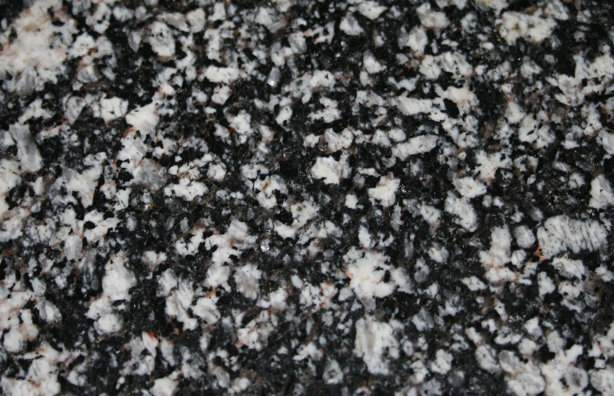 Gailbach Tonalit. Muster ca. 15 x 12 cm